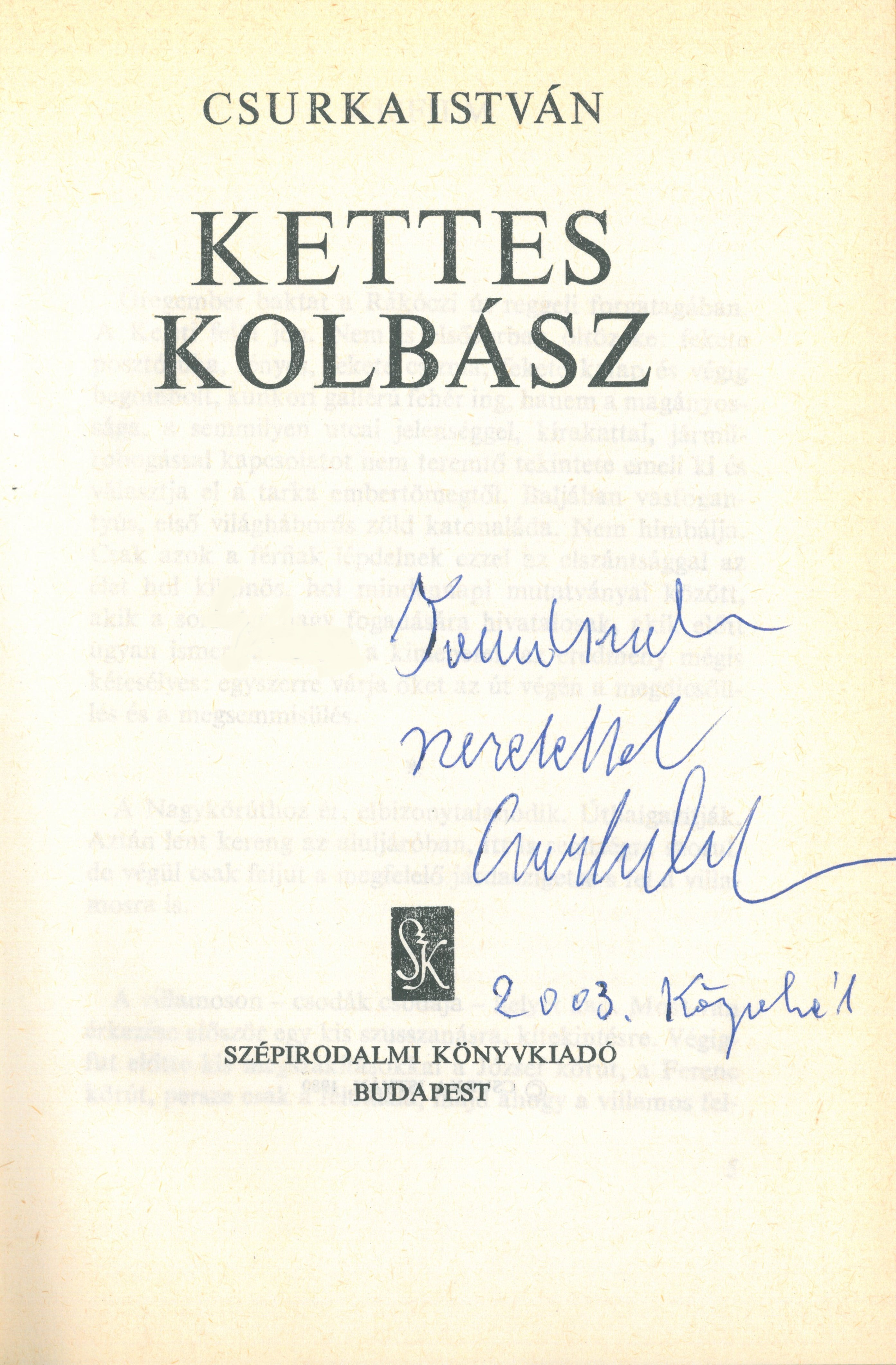 Csurka István író politikus által dedikált Kettes kolbász c.kötetének címlapja